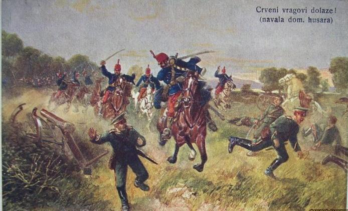 Navala domobranskih husara, razglednica iz vremena Prvog svjetskog rata